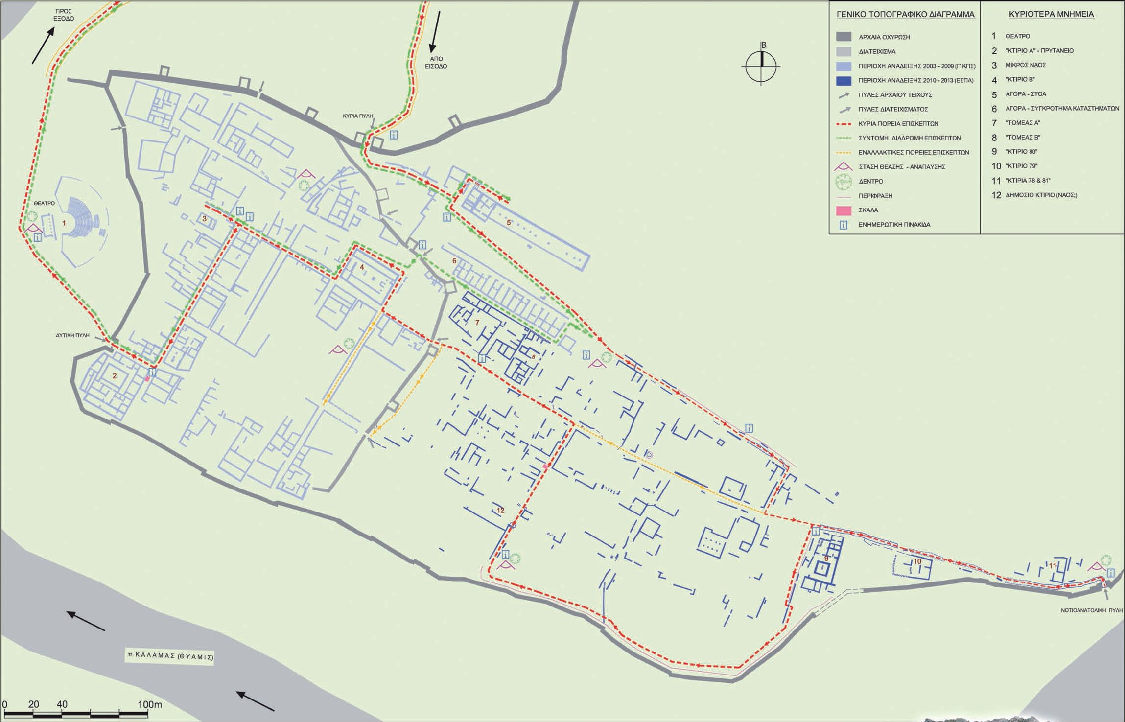 Κάτοψη αρχαιολογικού χώρου